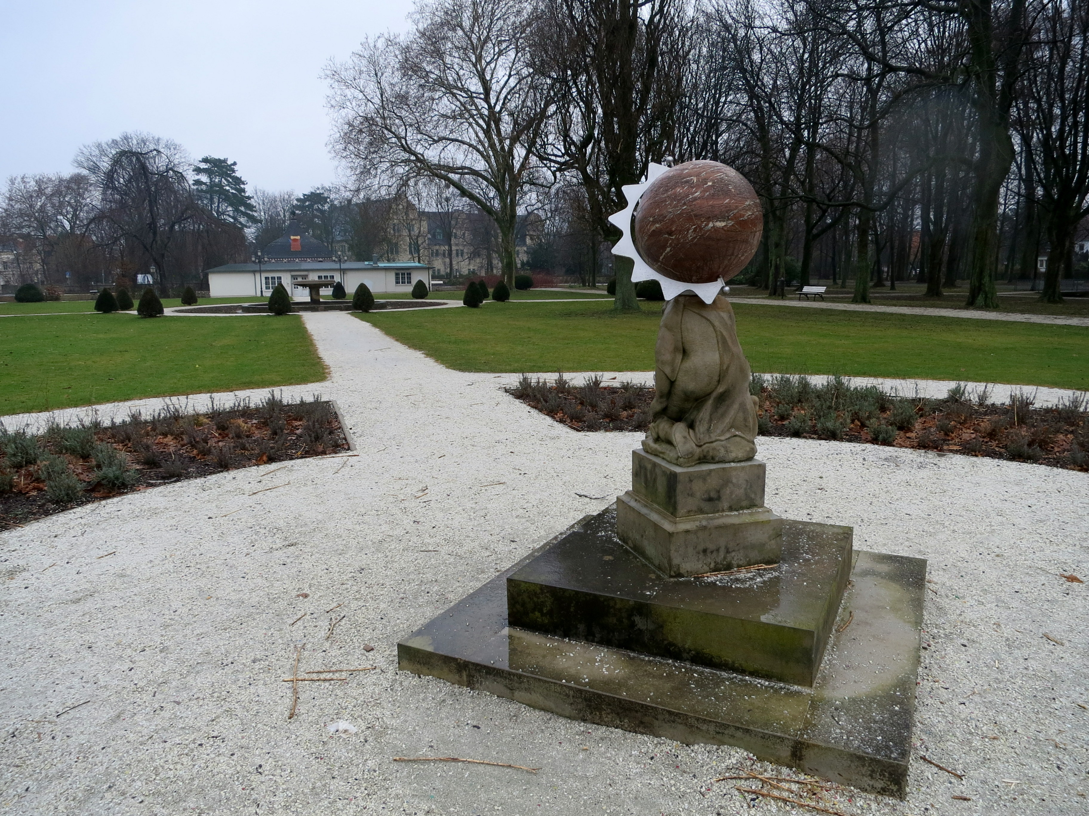 Der Stadtgarten ist im Winter wenig belebt.